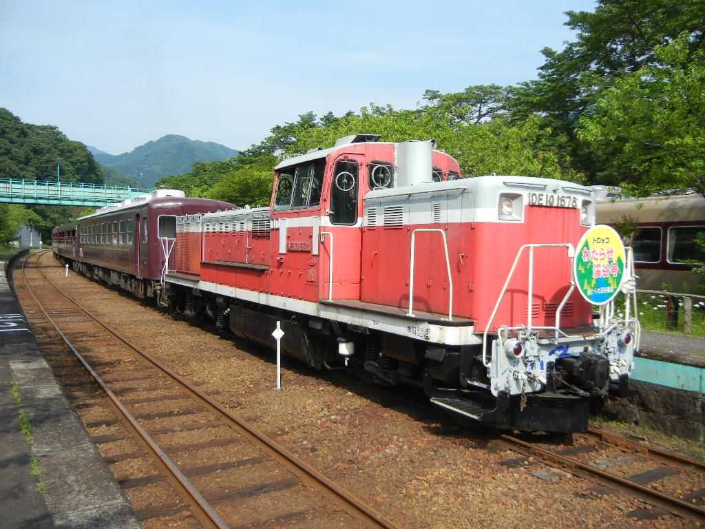 Watarase-Torokko. 栃木県内を走るわたらせ渓谷鐵道のトロッコ列車, Tochigi